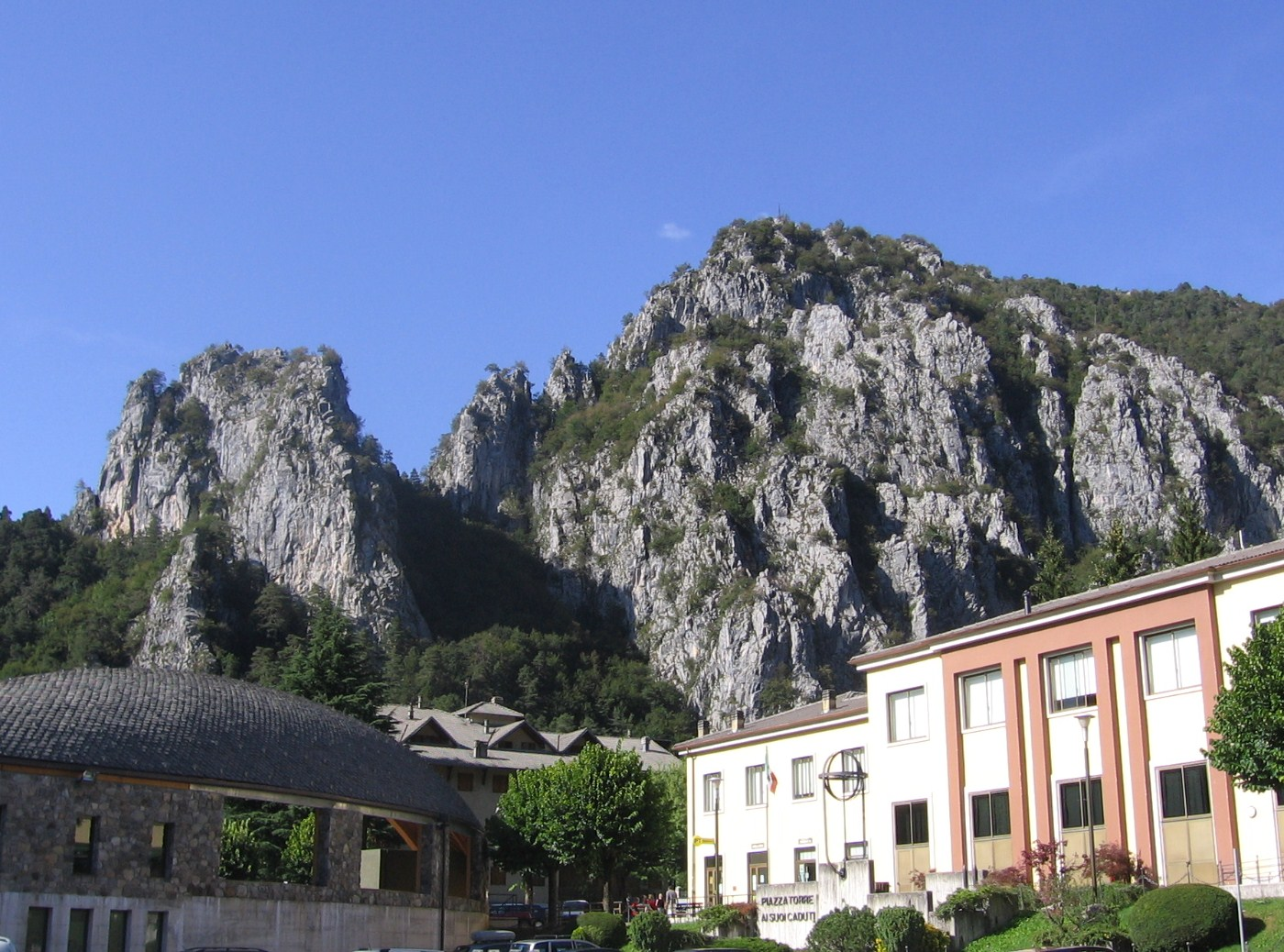 Piazzatorre, Bergamo, Italy